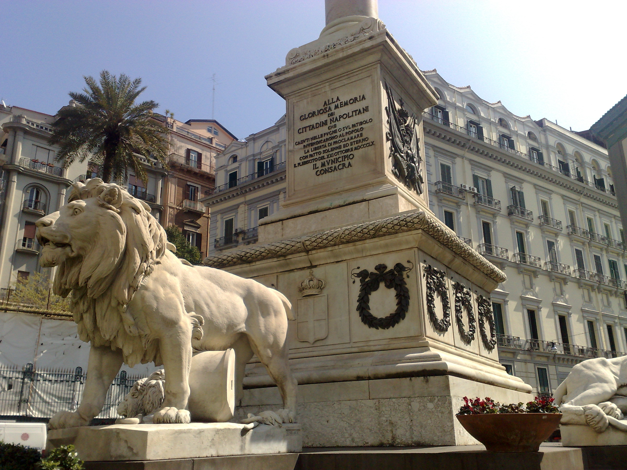 Monumento ai caduti. Particolare Leone.